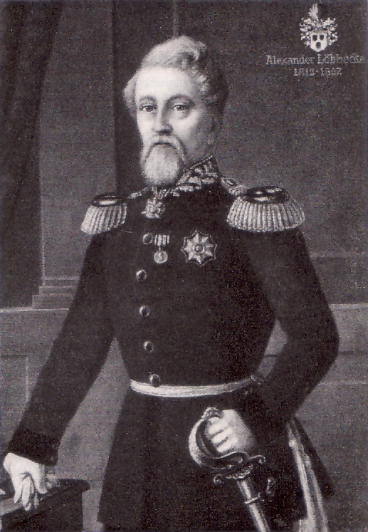 Alexander Löbbecke (* 17. August 1812 in Iserlohn; † 23. Dezember 1867 in Iserlohn), Offizier und Kaufmann.